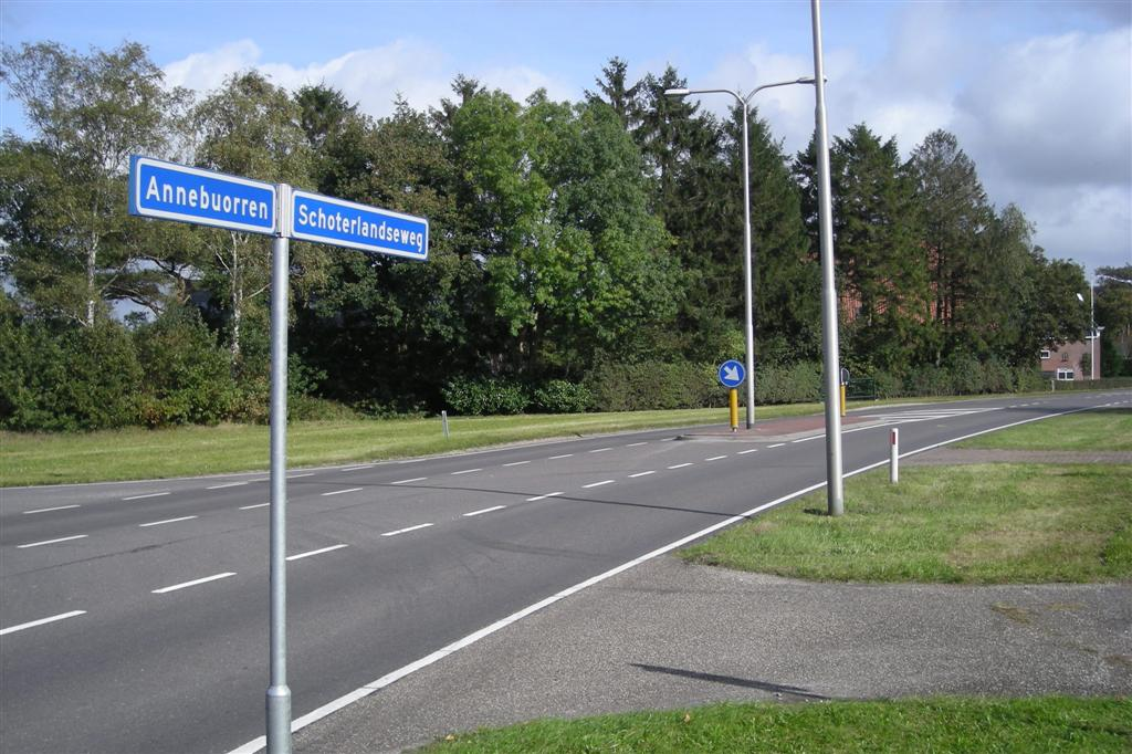 Anneburen